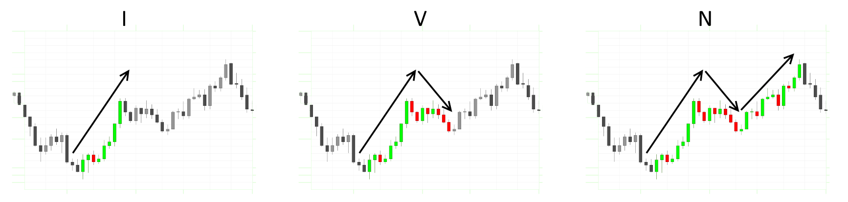 Ichimoku - Vagues I/V/N